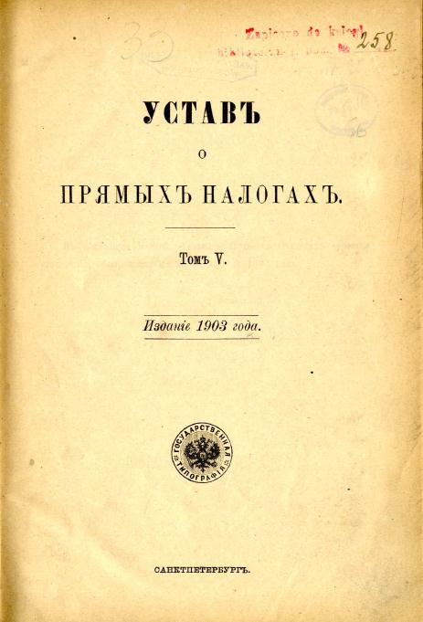 Устав о прямых налогах